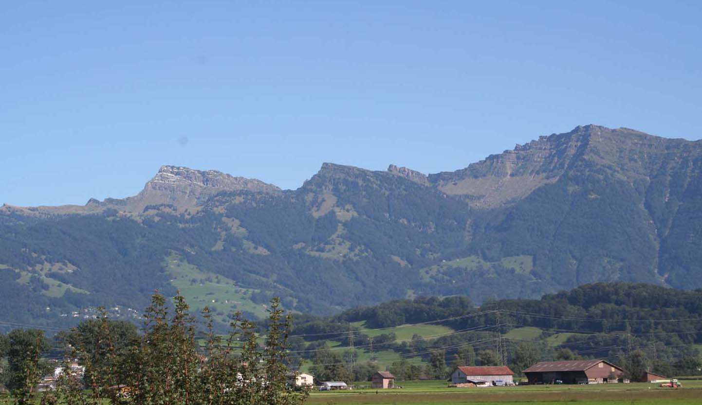 Speer, Chüemettler und Federispitze